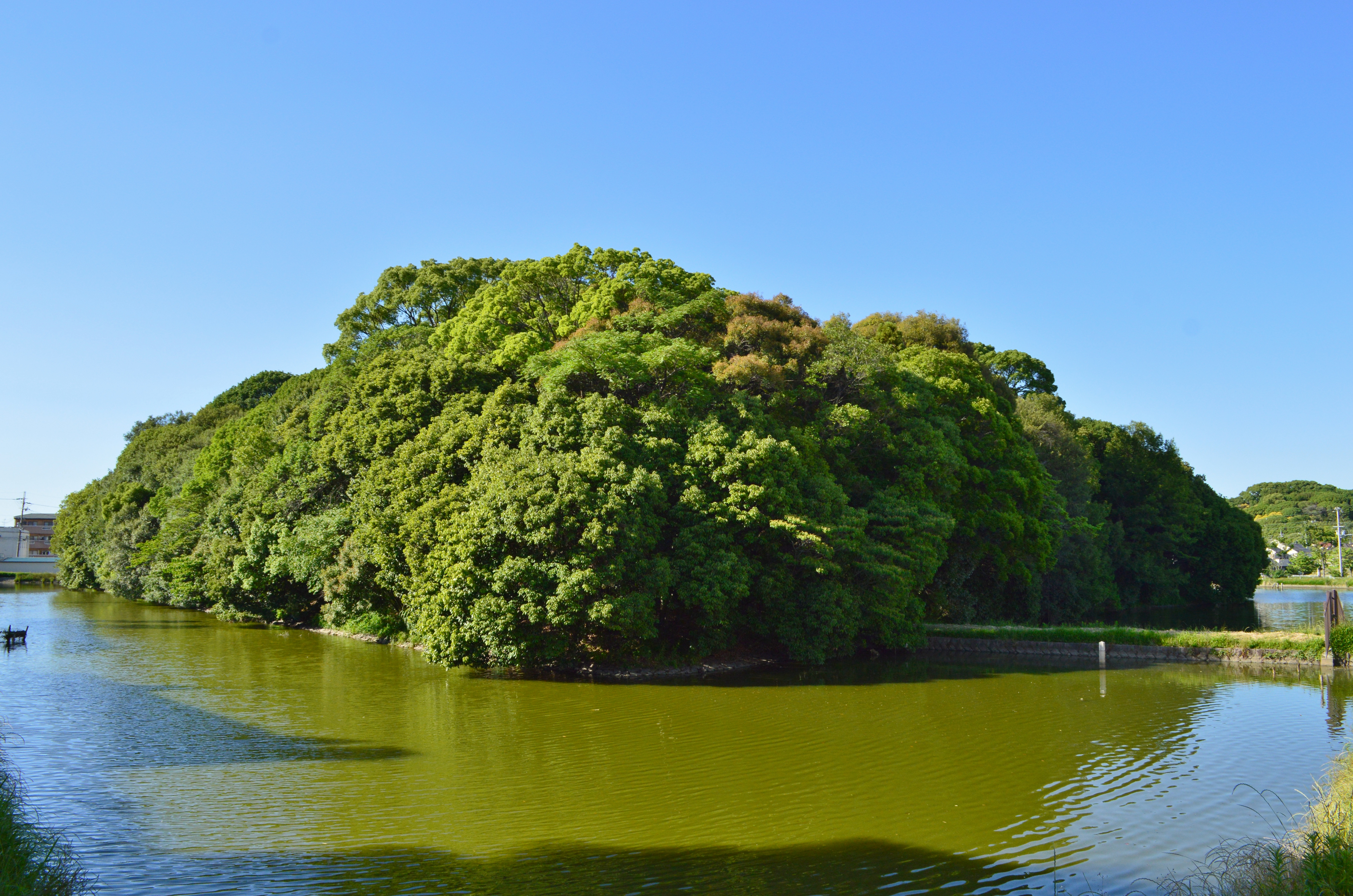 白髪山古墳 墳丘と周濠